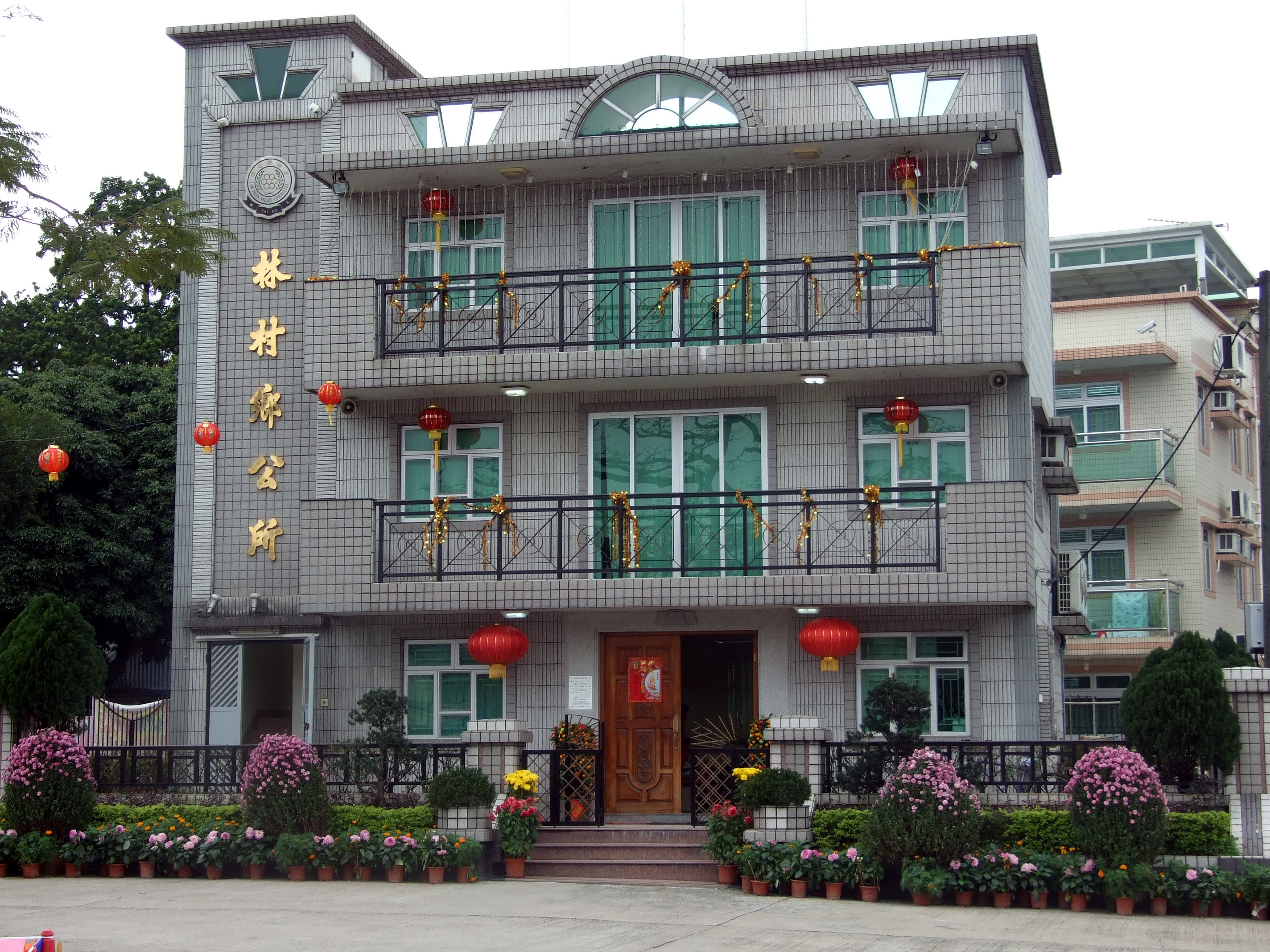 中文（香港）: 林村鄉公所